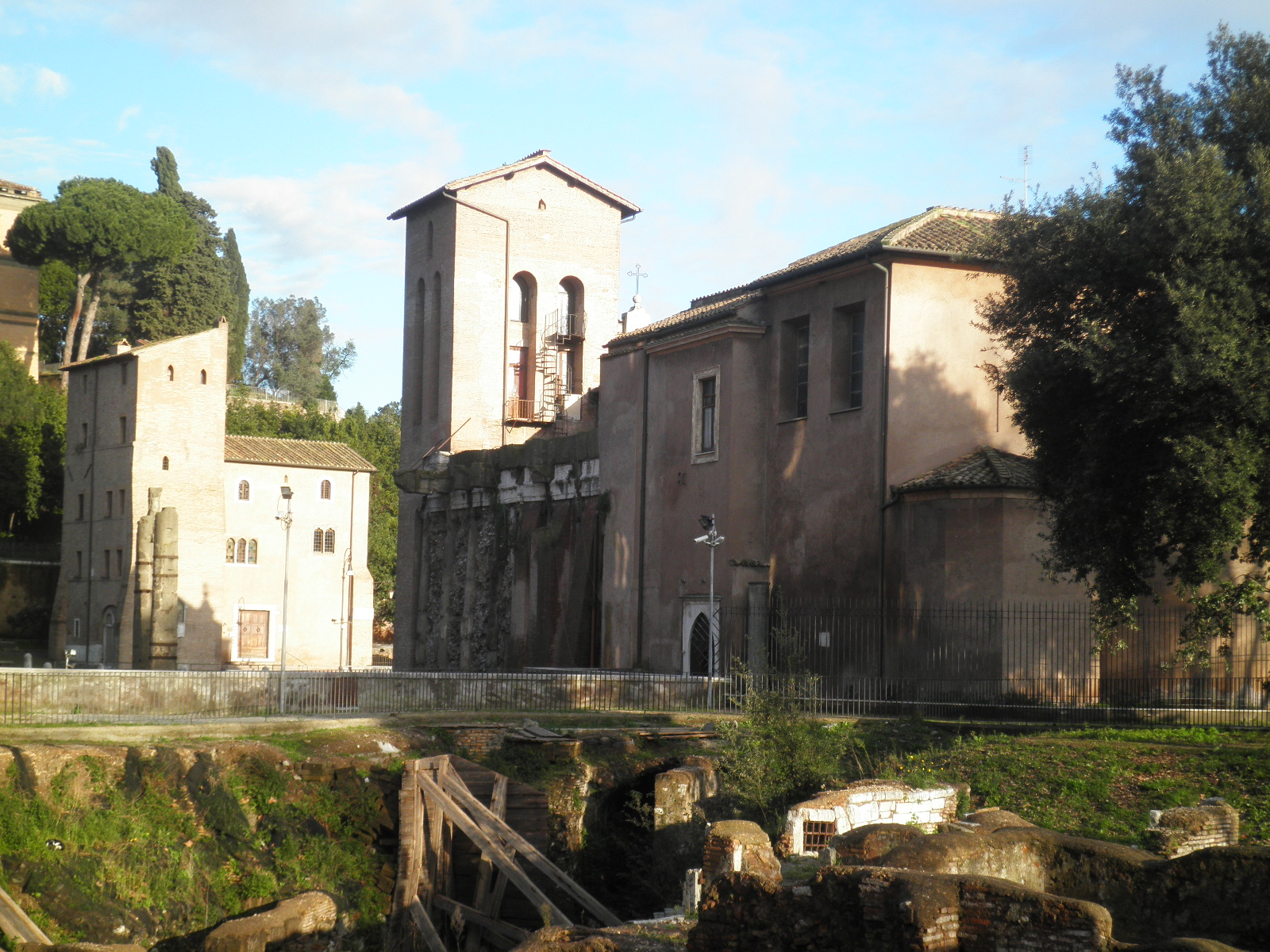 Roma, Torri dei Pierleoni a Monte Savello, oggi divise dalla via del Teatro di Marcello. In primo piano, gli scavi di monte Savello. Subito dietro, la chiesa di S. Nicola in Carcere, il cui campanile è costituito da una delle due torri.